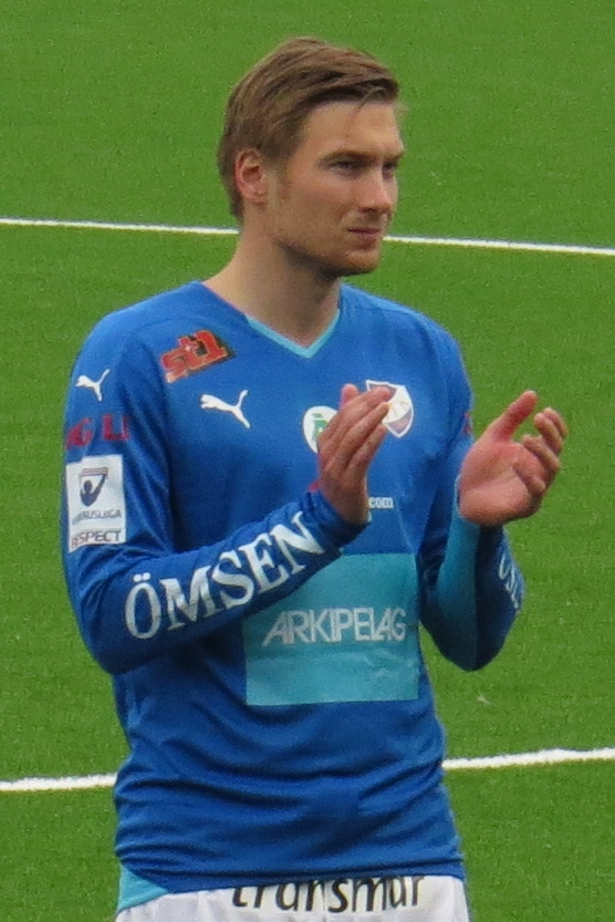 Kristian Kojola, suomalainen jalkapalloilija IFK Mariehamnin joukkueessa kaudella 2015.